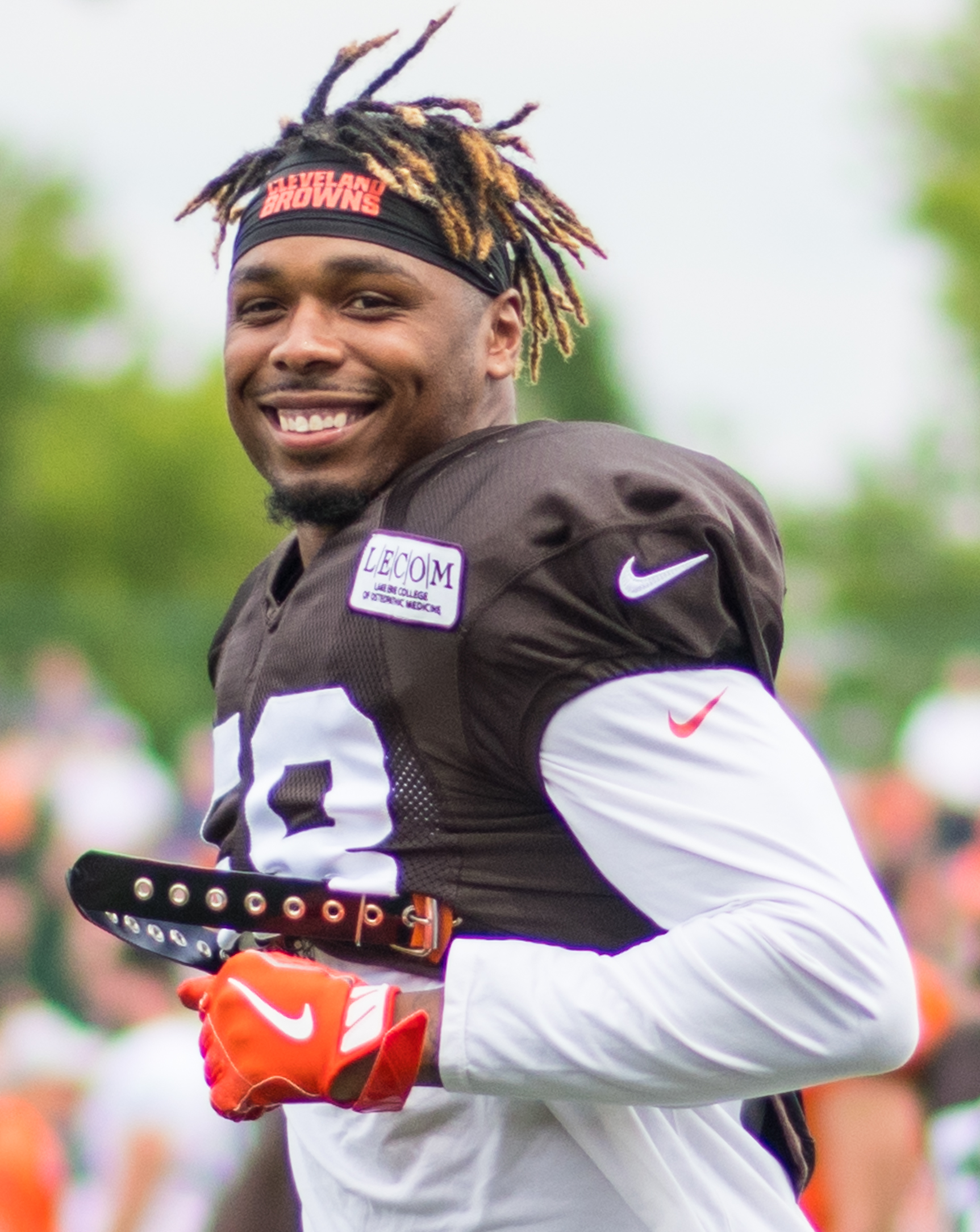 Christian Kirksey